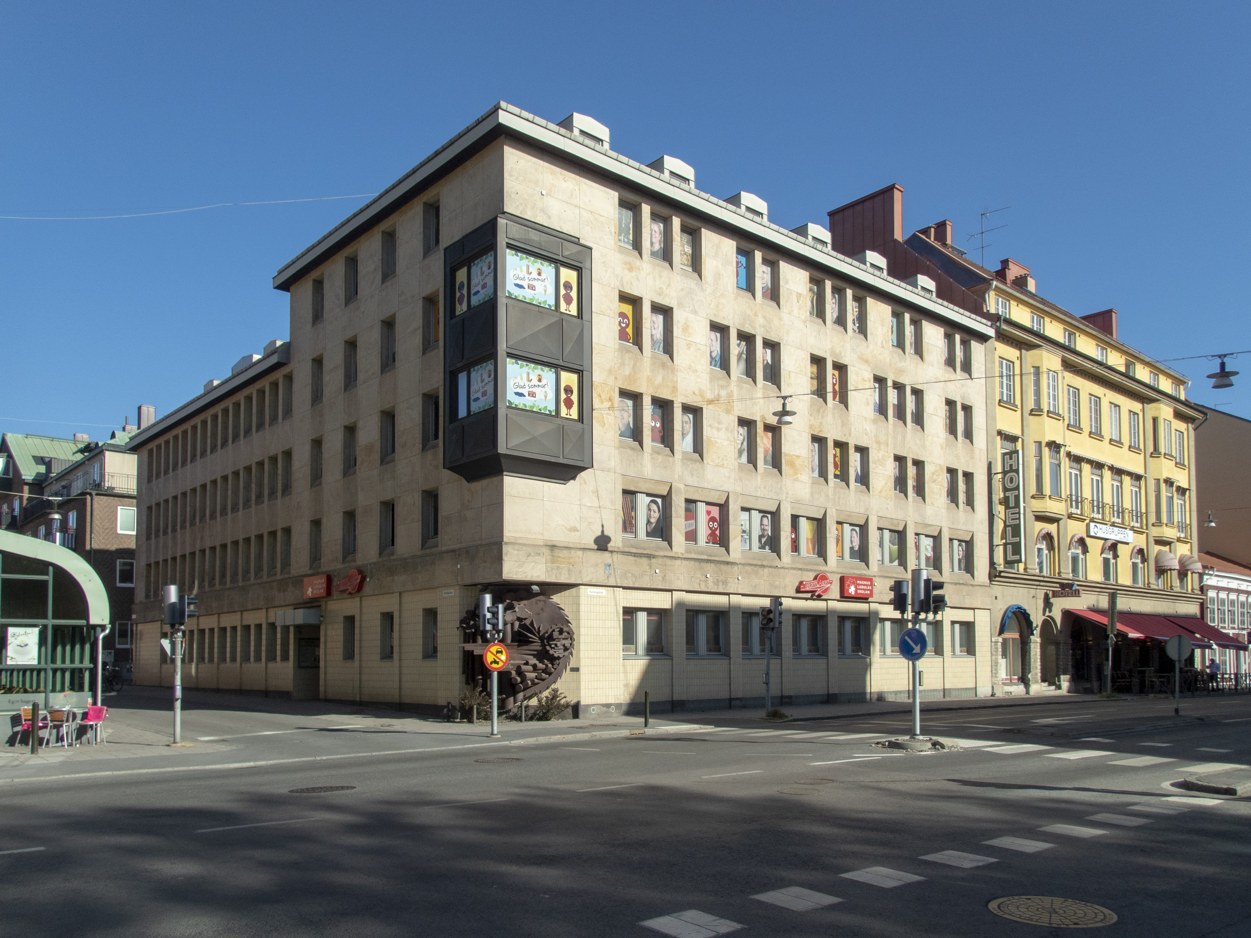 Graniten 15, Skolgatan 2 Jönköping. Byggnadsår 1977. Arkitekter: Flensbors arkitektkontor, Kurt Andersson